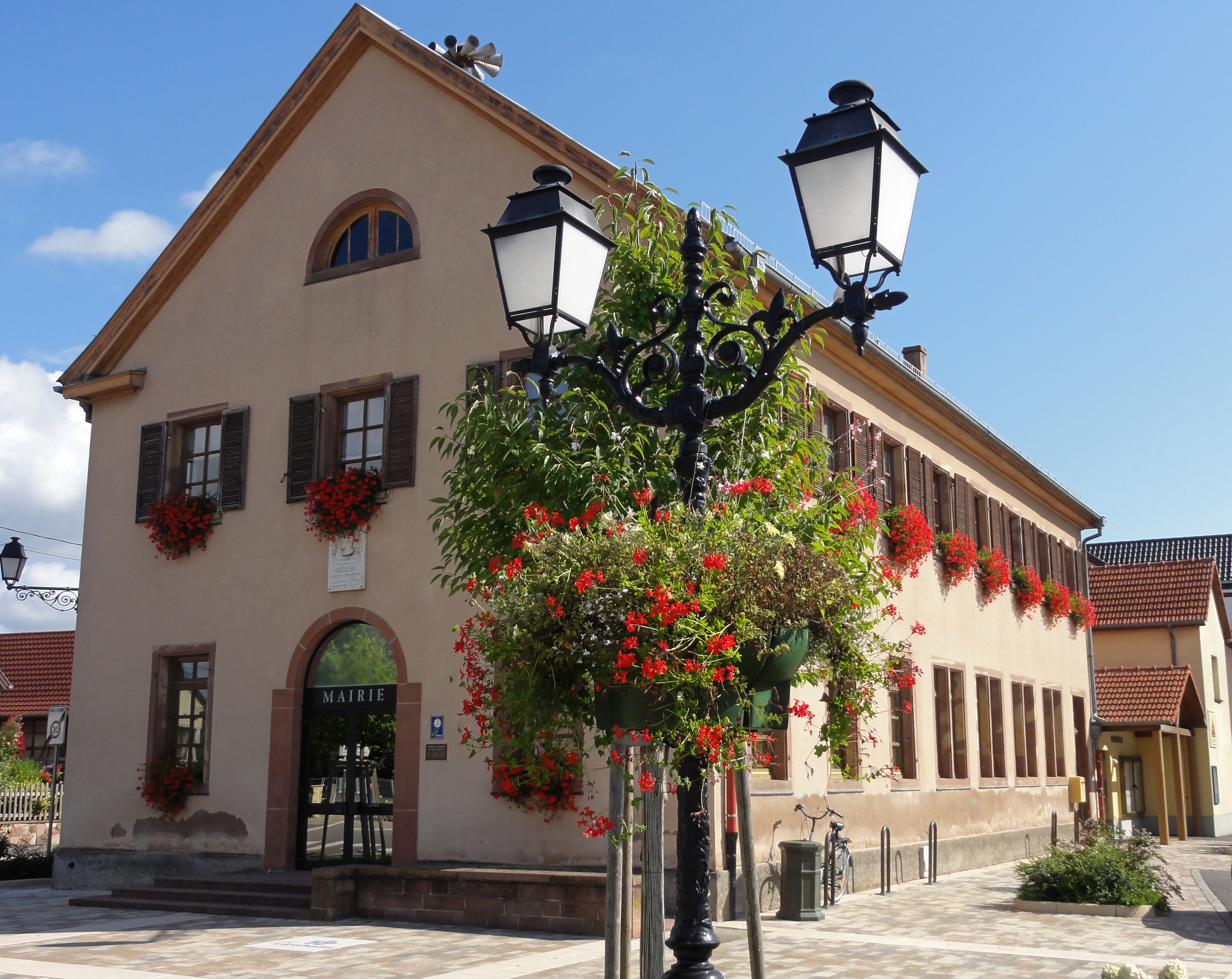 Alsace, Bas-Rhin, Lipsheim, Mairie.